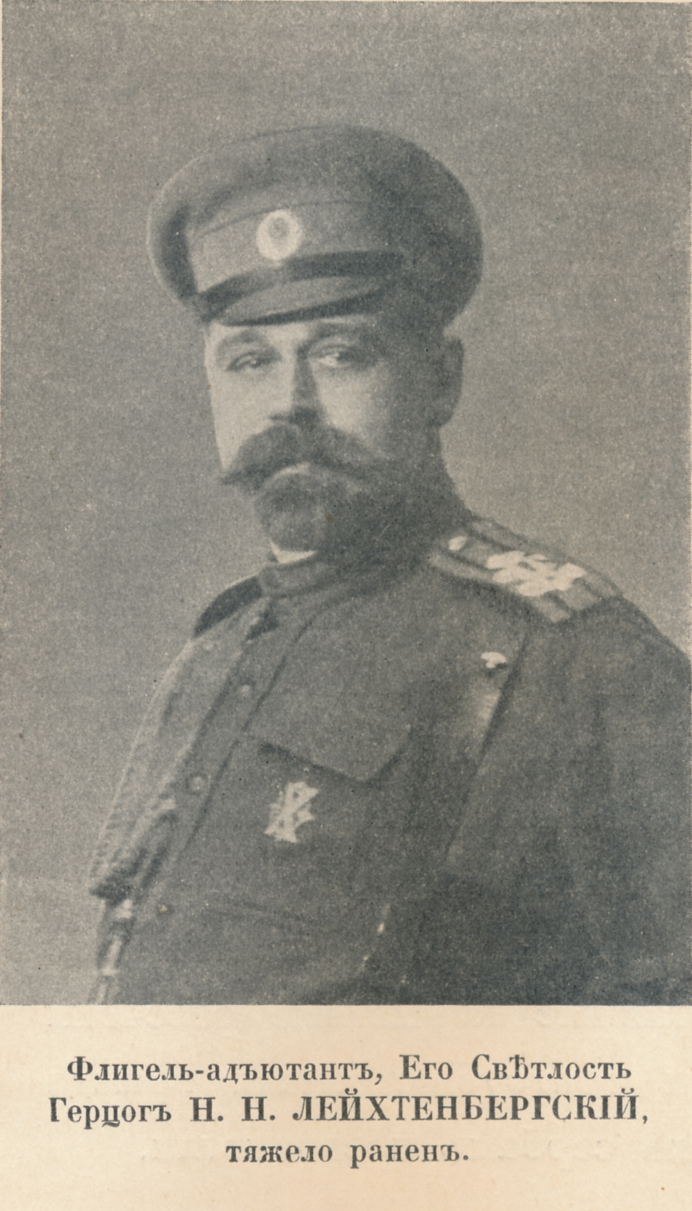 Герцог Н.Н. Лейхтенбергский в журнале "Летопись войны", 1915, № 61, с. 970.